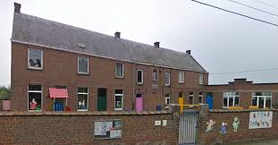 L'ancien Batiment de l'école du Verger qui est abrite actuellement la maison de village "les châtons".